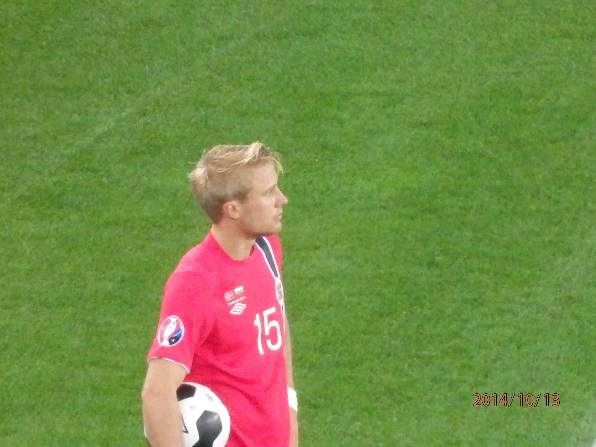 Per Ciljan Skjelbred 2014